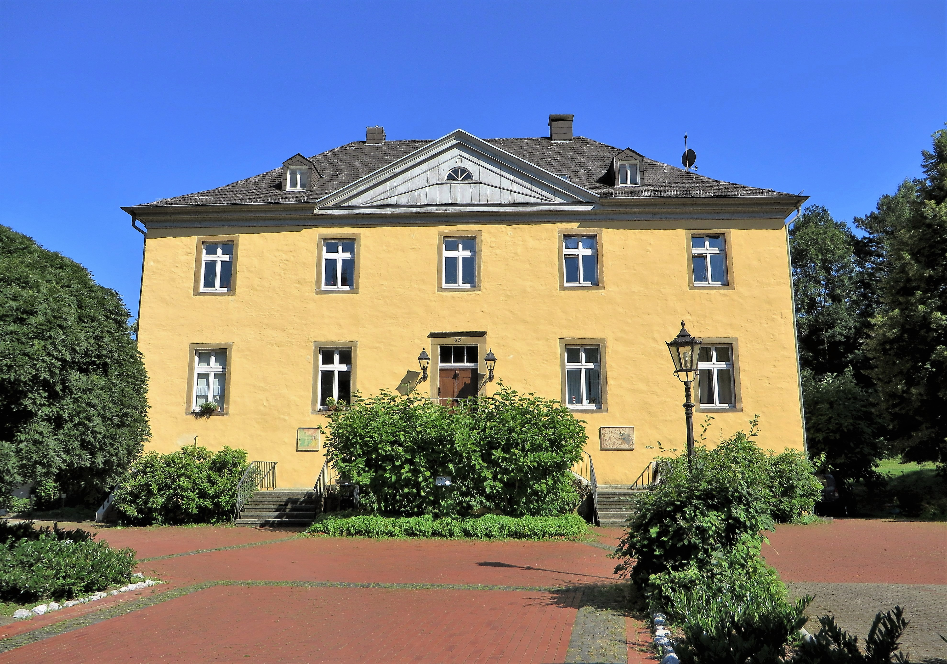 Denkmalgeschütztes Haus Dahl im Hagener Stadtteil Dahl, Dahler Straße. An Stelle des im Jahre 1188 erstmals urkundlich erwähnten ehemaligen Adelssitzes wurde das Herrenhaus 1822–1823 auf den Fundamenten des Vorgängerbaus im frühklassizistischen Stil errichtet. Eigentümer und Bauherr war der Gutsbesitzer und Landrat Friedrich Gerstein (1780–1836). Heute gehört Haus Dahl einer Stiftung und dient Wohnzwecken. Im benachbarten ehemaligen Postgebäude das auch der Stiftung gehört ist seit 2009 das Dahler Heimatmuseum untergebracht. This is a photograph of an architectural monument.